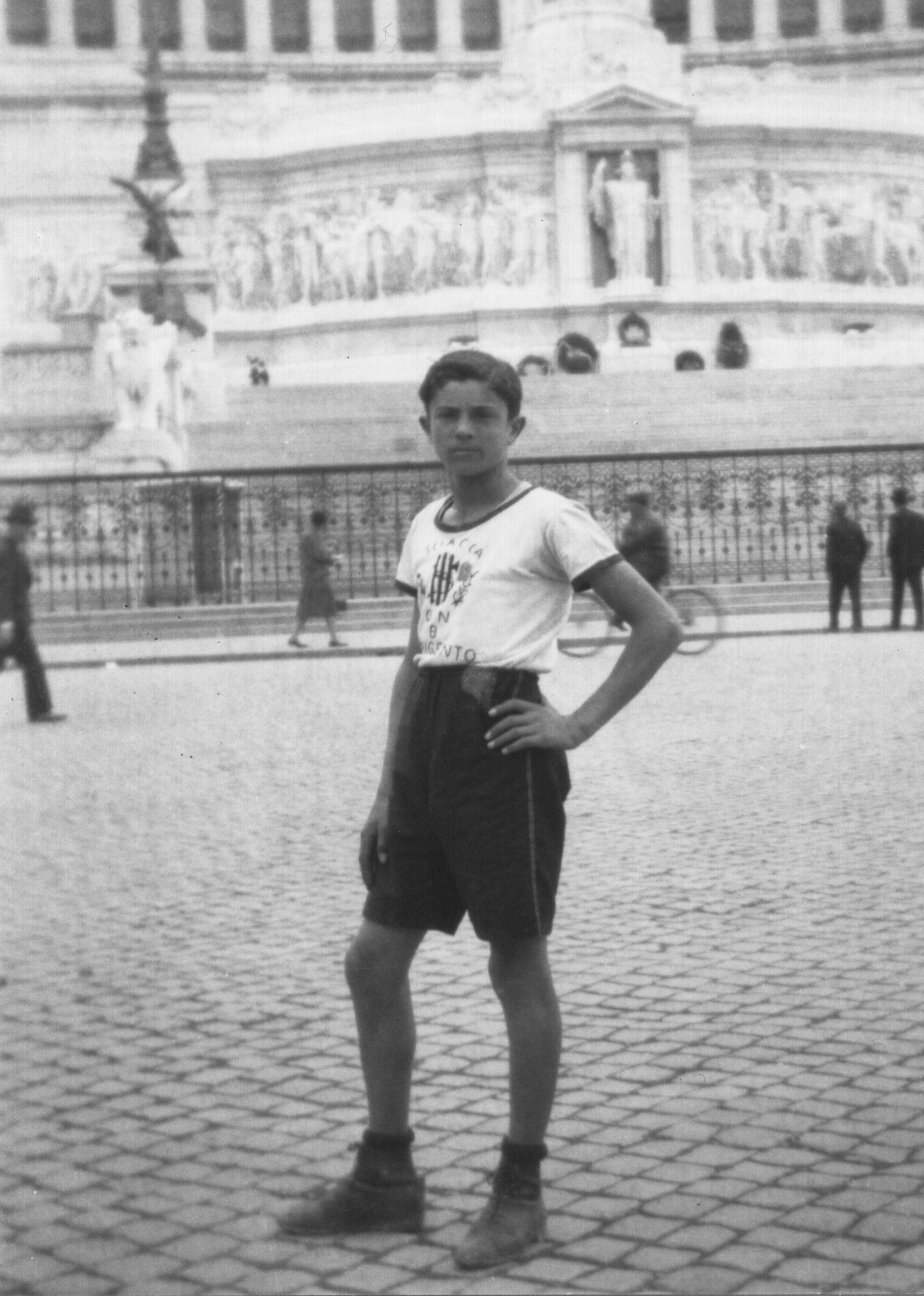 Silvio Riggio, inquadrato nei "Balilla" fascisti, in posa davanti all'Altare della Patria a Roma. 1924 circa. Foto dell'archivio privato della famiglia Riggio.